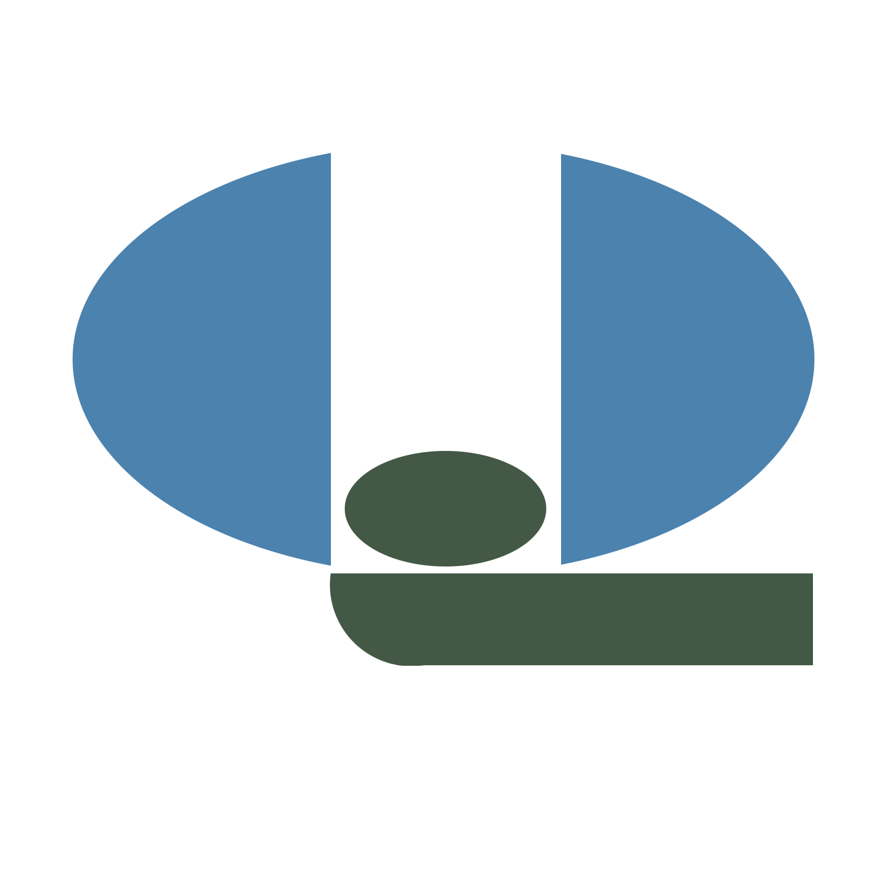 Cette image de marque appartient à Interaction Qui ltée, une OBNL artistique du Saguenay—Lac-Saint-Jean (Québec,Canada)